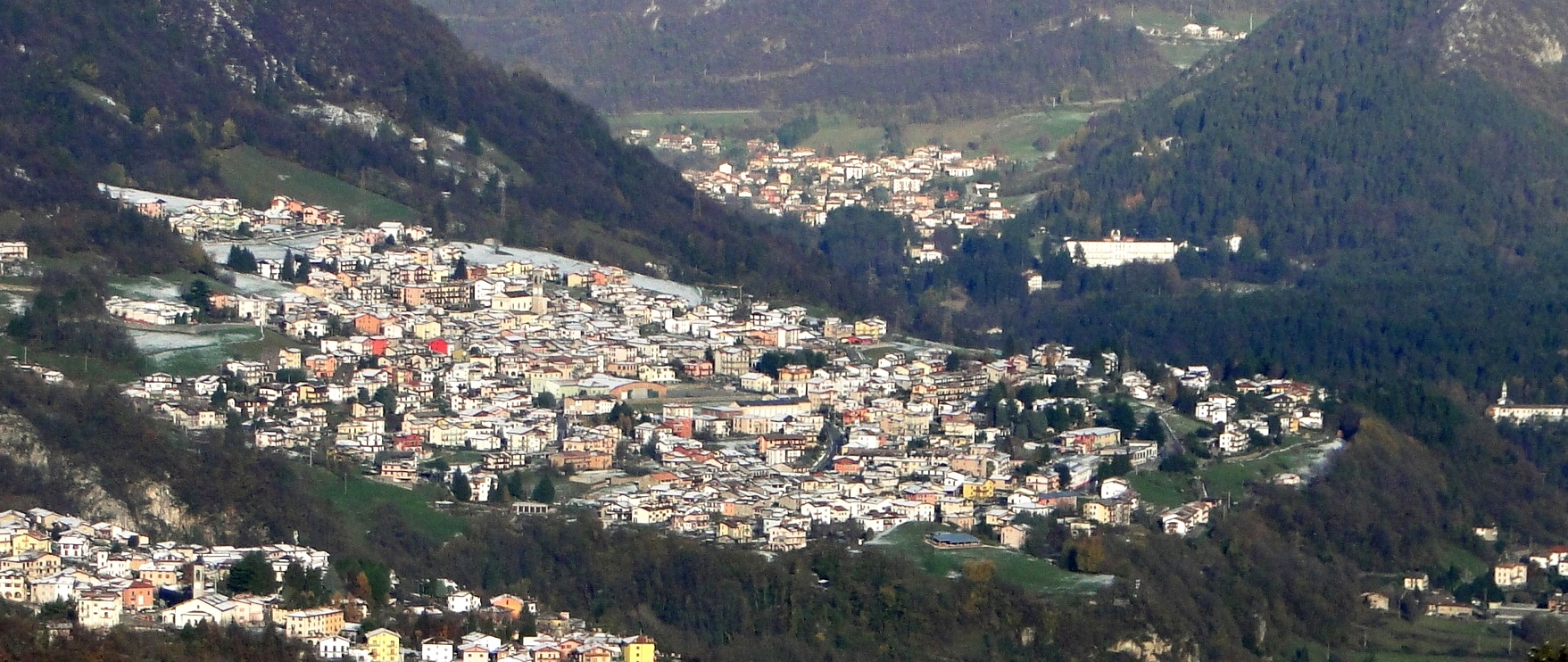 Panorama di Parre (BG)